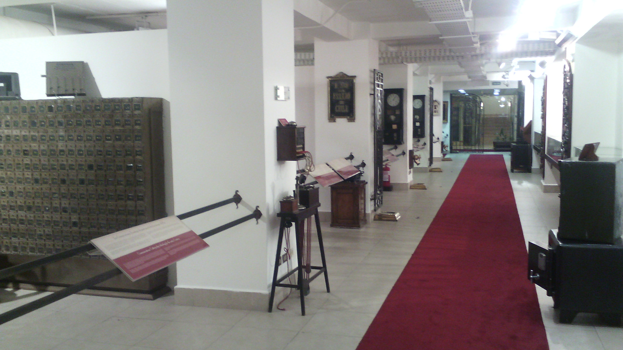 Pasillo principal del Museo del Ahorro